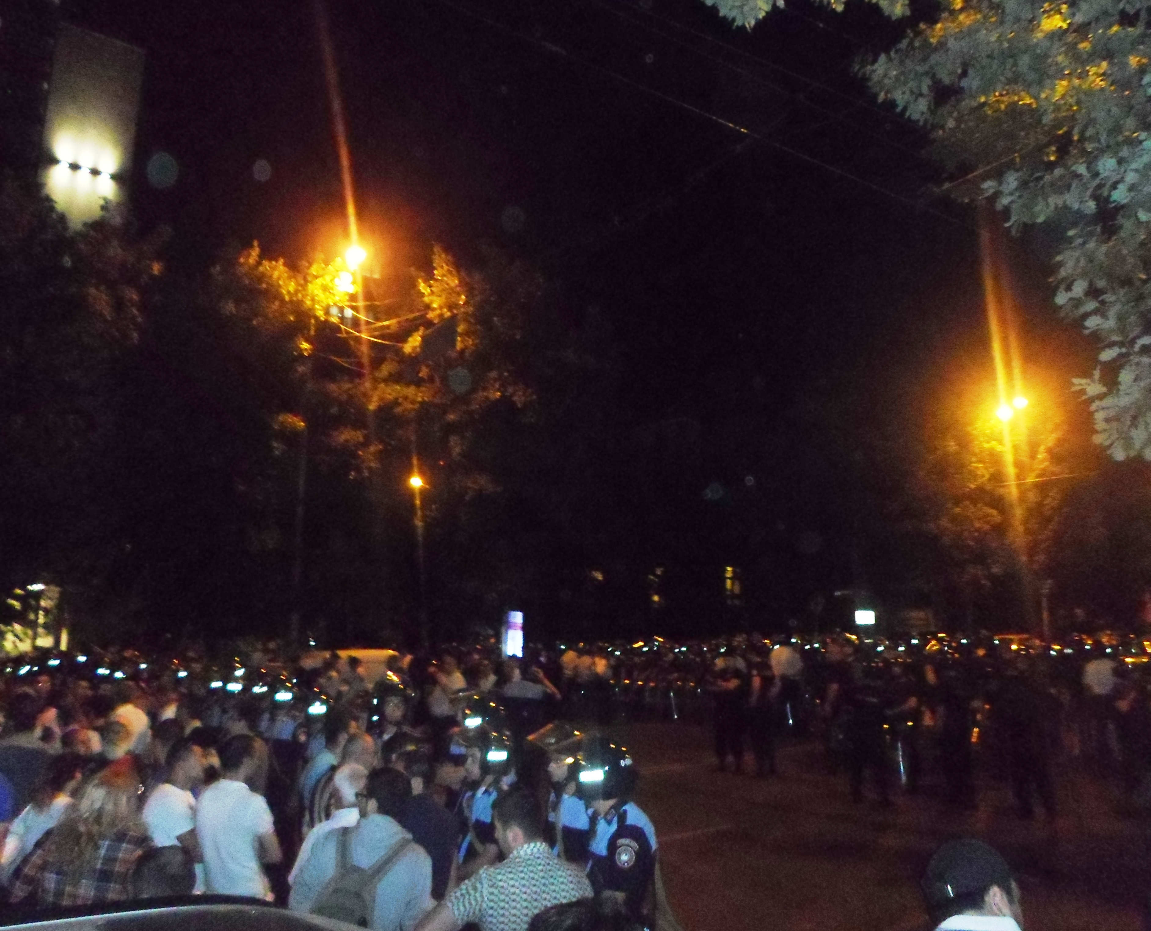 Բաղրամյան պողոտան՝ ընդդեմ հոսանքի թանկացման ցույցի մասնակիցների հանդեպ զանգվածային բռնություններից ժամեր առաջ, հունիսի 22